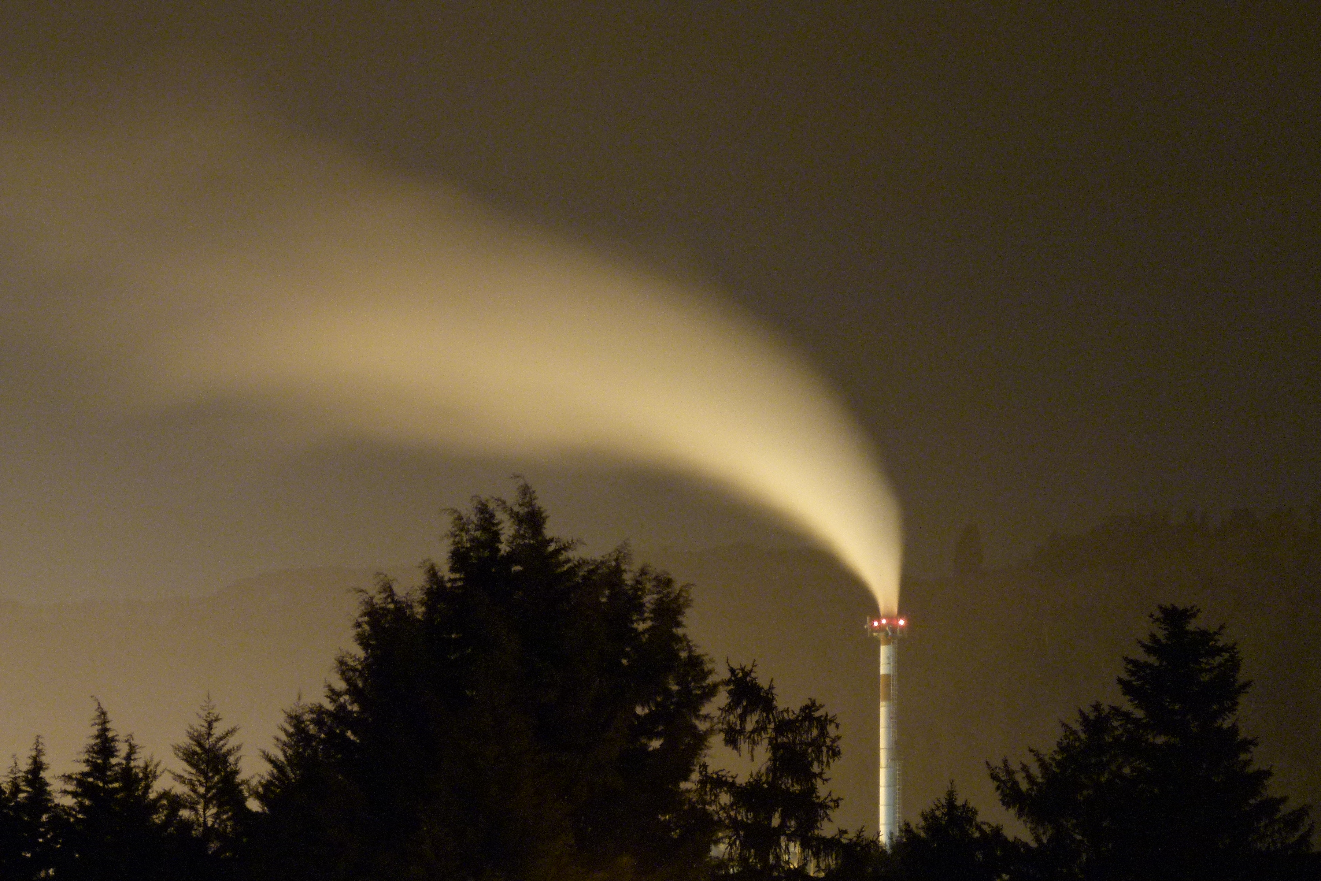 This photo was taken with Panasonic Lumix DMC-FZ100 camera, thanks to Panasonic. You can see all photographs in category: Taken with Panasonic Lumix DMC-FZ100.